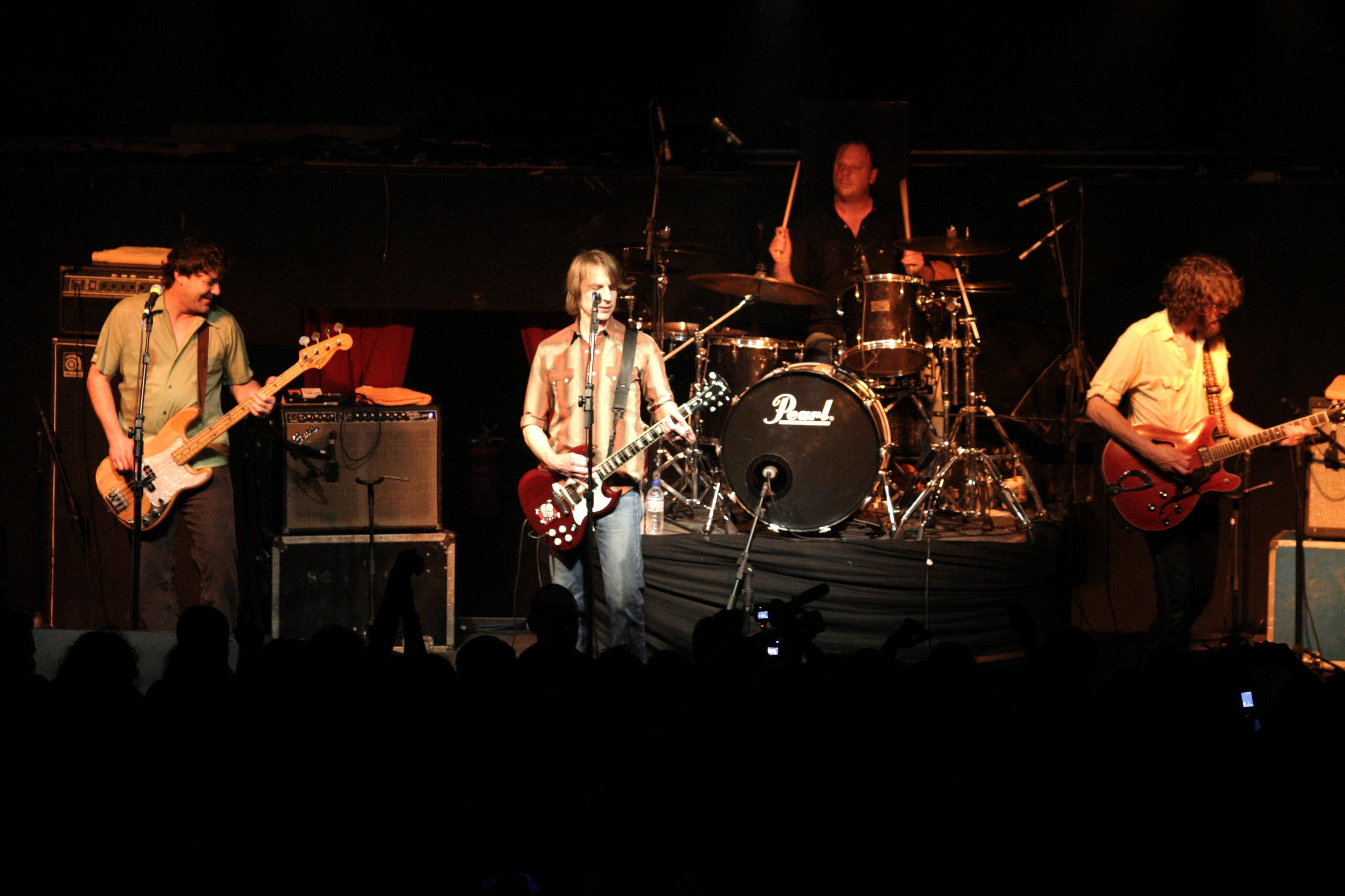 5 musicians